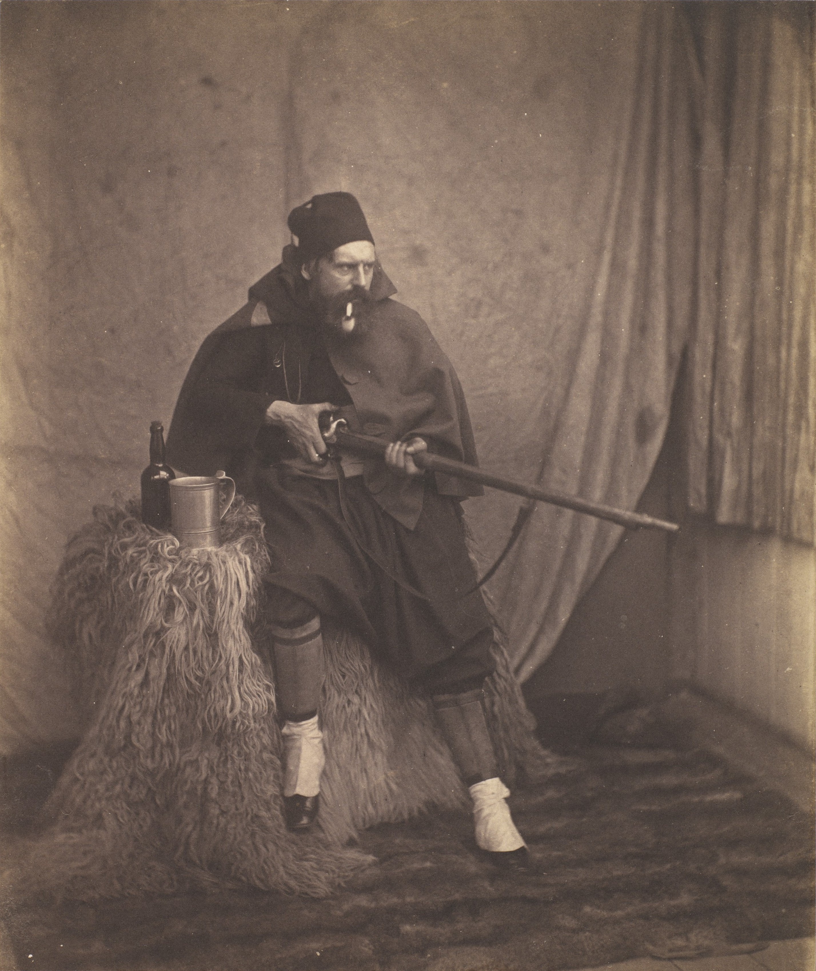 Roger Fenton (1819-1869), englischer Fotograf. Selbstporträt als Zuave.